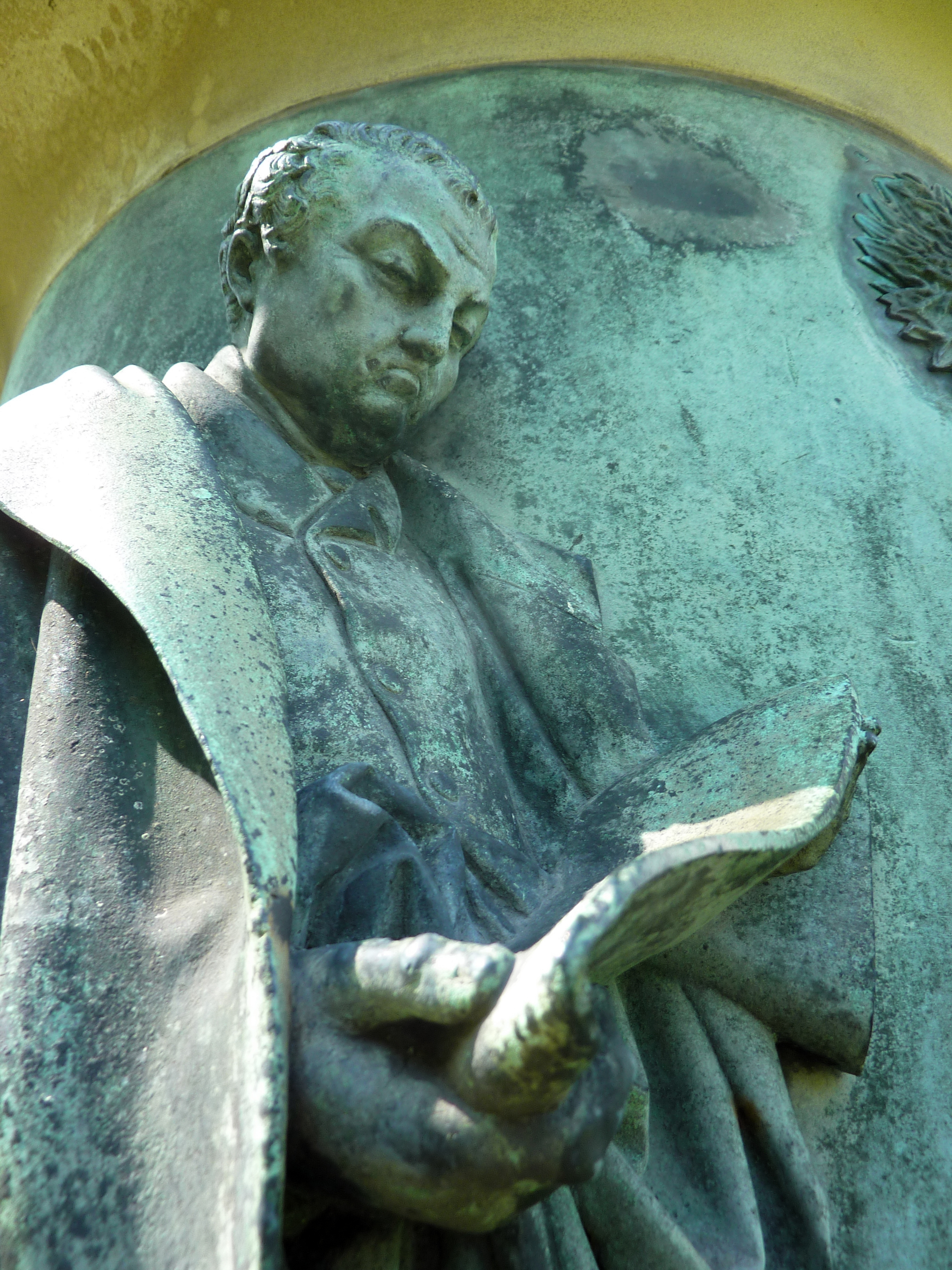 Detail des Denkmals für Jakob Guiollett (deutscher Beamter und Politiker, 1746–1815), Initiator und Baumeister der Wallanlagen in Frankfurt am Main. Das Detailfoto zeigt eine Guiollett darstellende Figur am Bronze-Sockel des 1837 von Eduard Schmidt von der Launitz gestalteten Denkmals in Frankfurt.